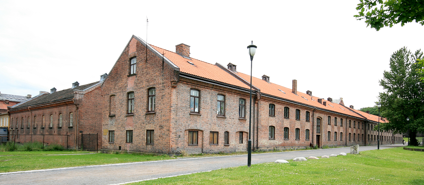 Kvaleristallen, Akershus festning, Oslo. Eldste del bygd 1867; utvida 1894 og 1901. Brukes nå av Miljøverndepartementet.